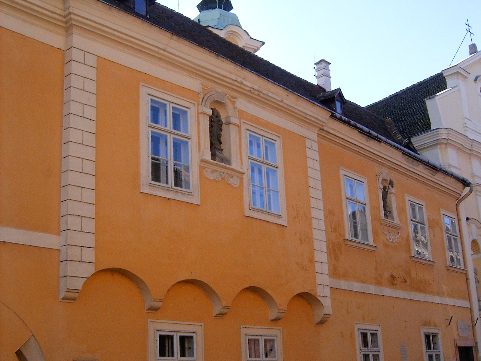 A Magyar Ispita a Rákóczi utca felől Győrben (Győr-Moson-Sopron megye)